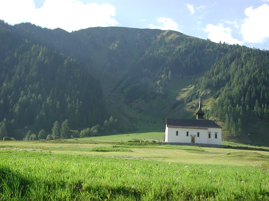 Muttergotteskapelle im Ritzinger Feld (Church in the Ritzinger Fields in Valais (Switzerland)